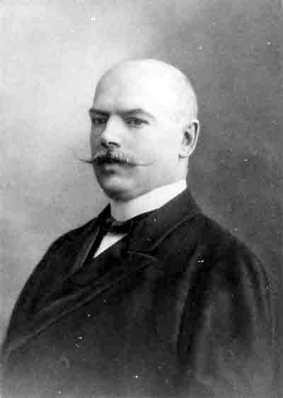 Boris Nikolsky